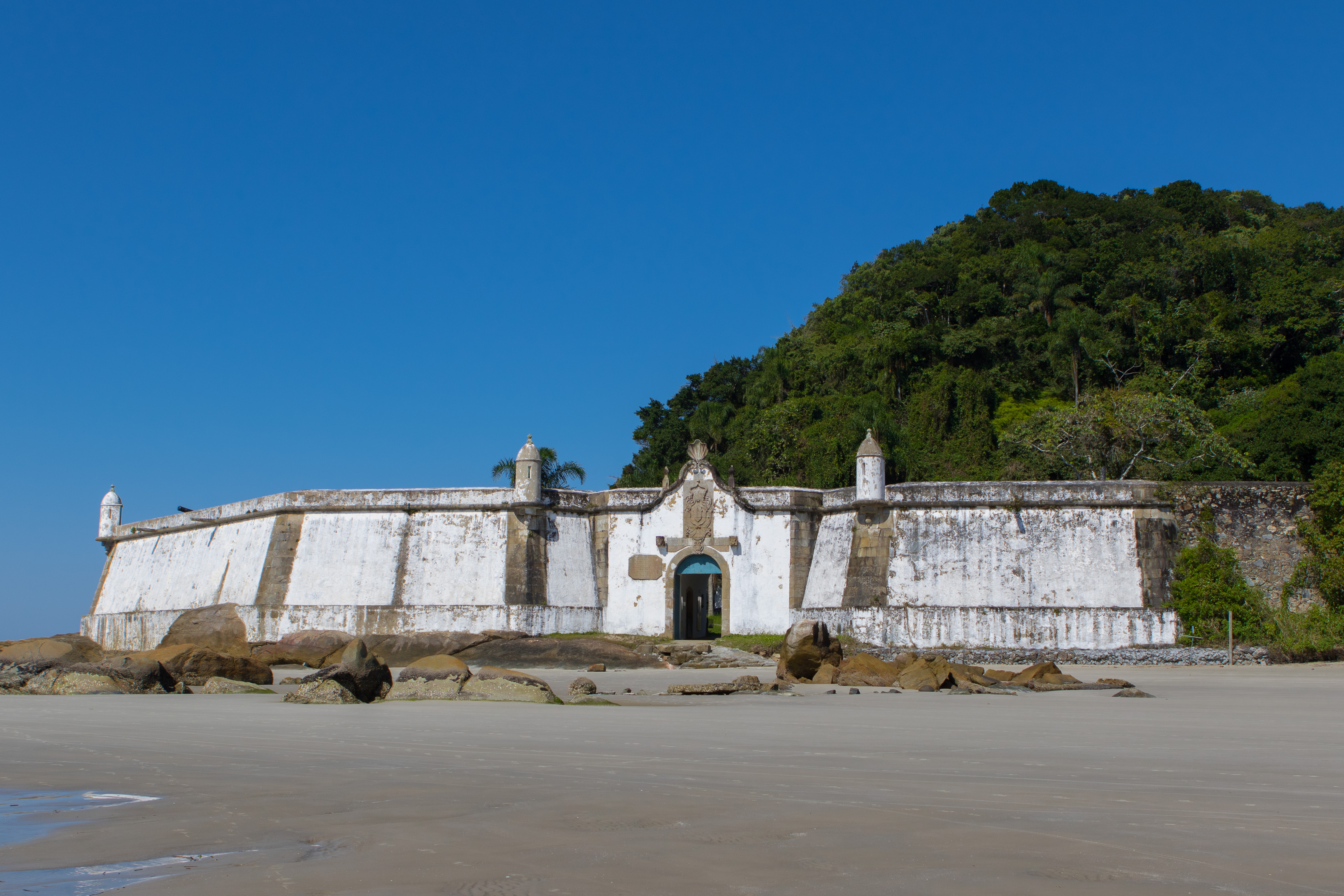 Fortaleza de Nossa Senhora dos Prazeres - Vista frontal